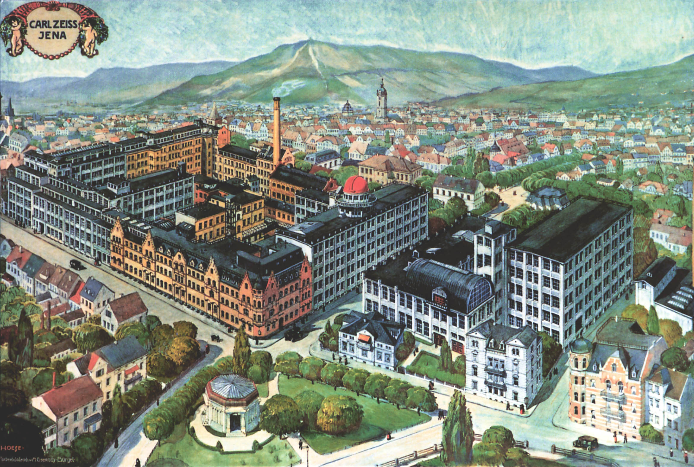 Das Zeiss-Hauptwerk in Jena um 1910 auf einer Postkarte